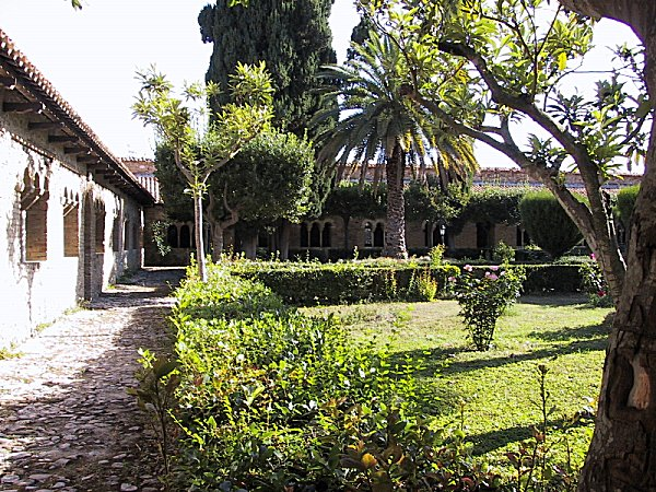 Chiostro dell'Abbazia di San Giovanni in Venere - agosto 2004 - Fotografia scattata dall'utente Francojotti. Di PD ed uso assolutamente libero.